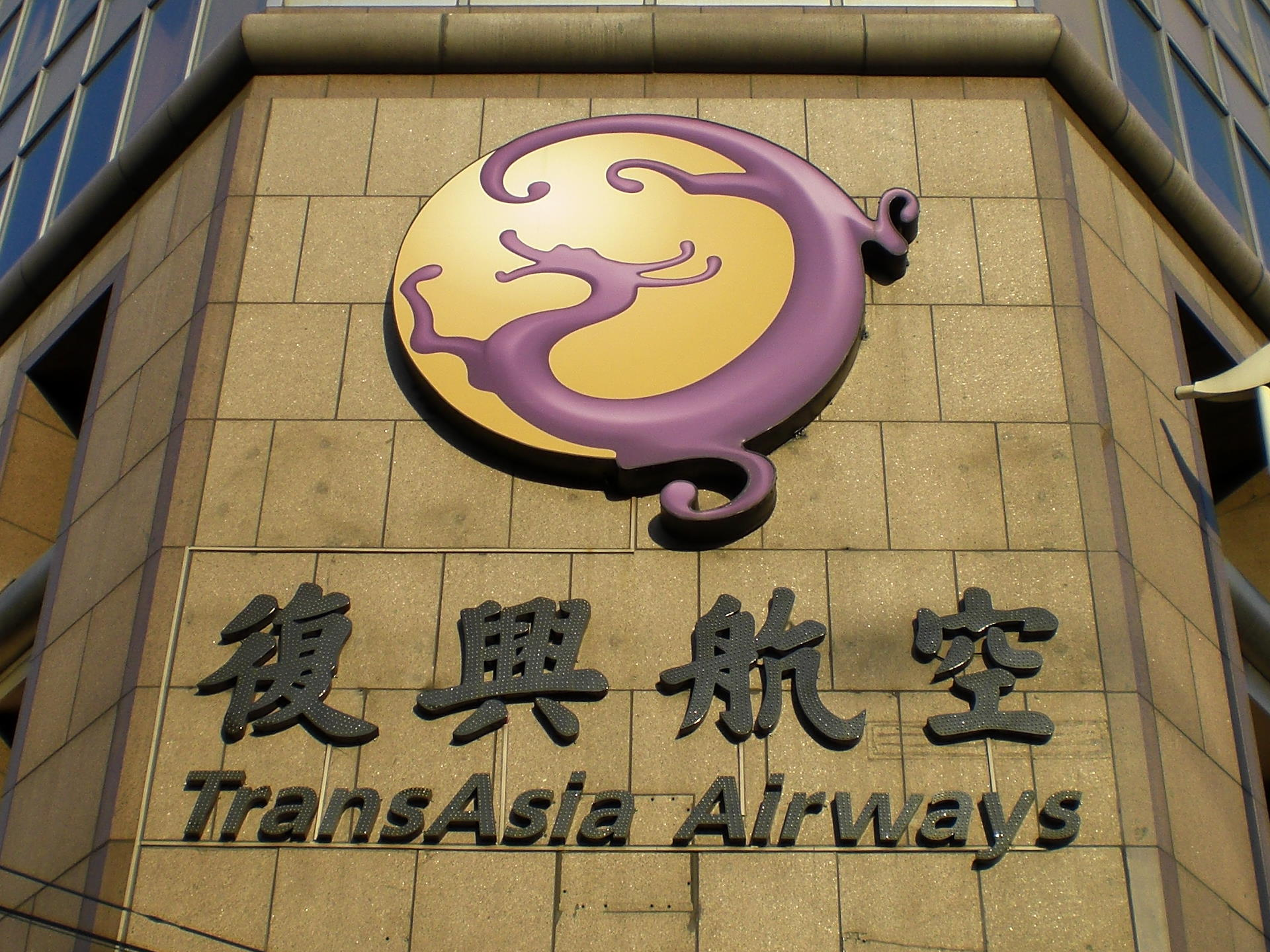 國產實業大樓外牆上的復興航空標誌。